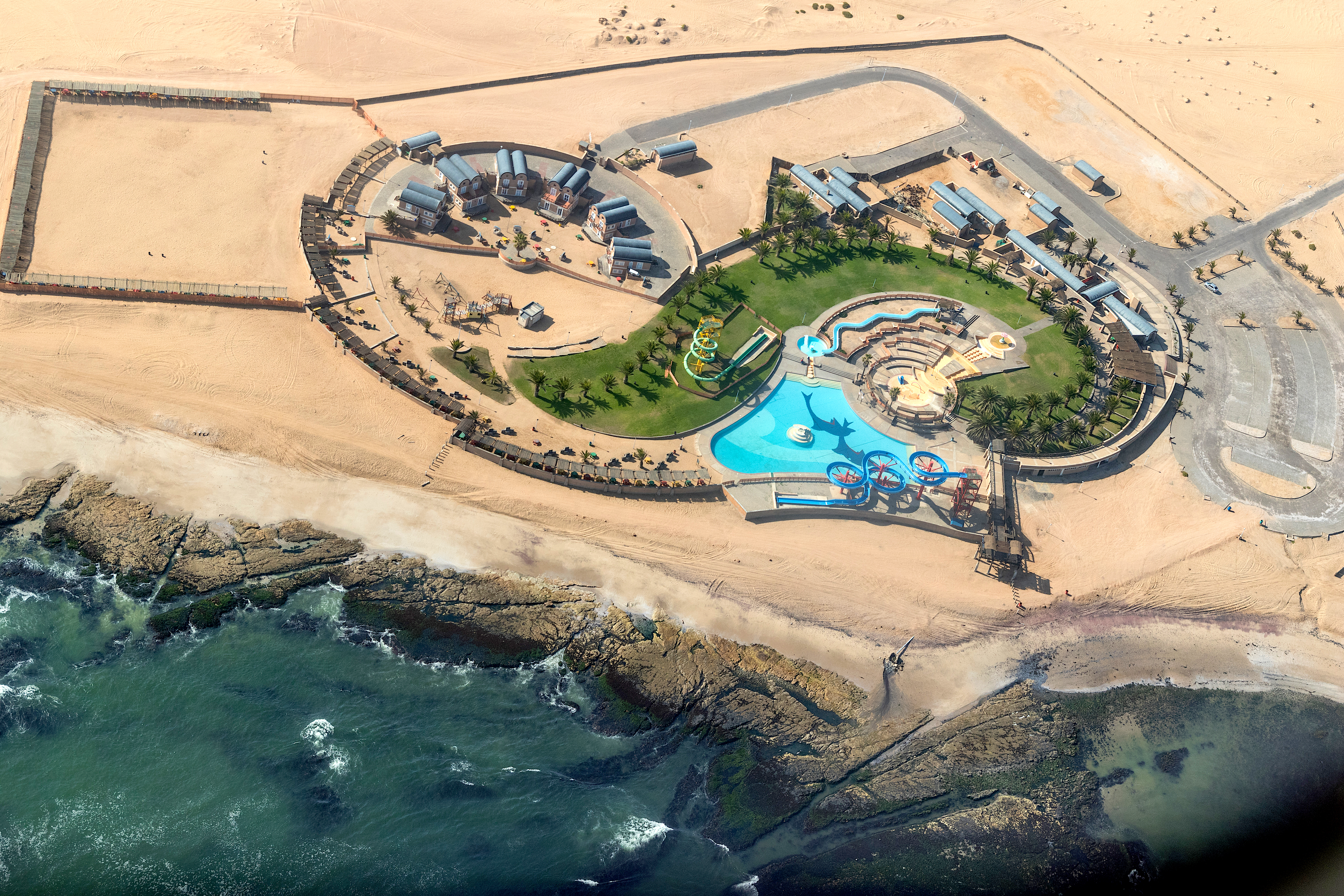 Langstrand (2018)